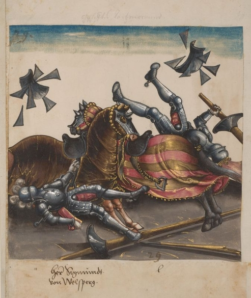 Seite aus dem Turnierbuch „Freydal“, KHM Wien, MS KK5073